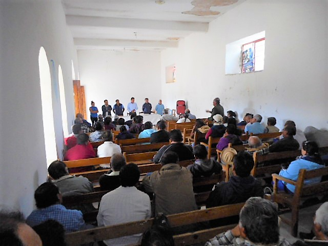 Asamblea municipal en San Juan Achiutla, Oaxaca, México, 2018